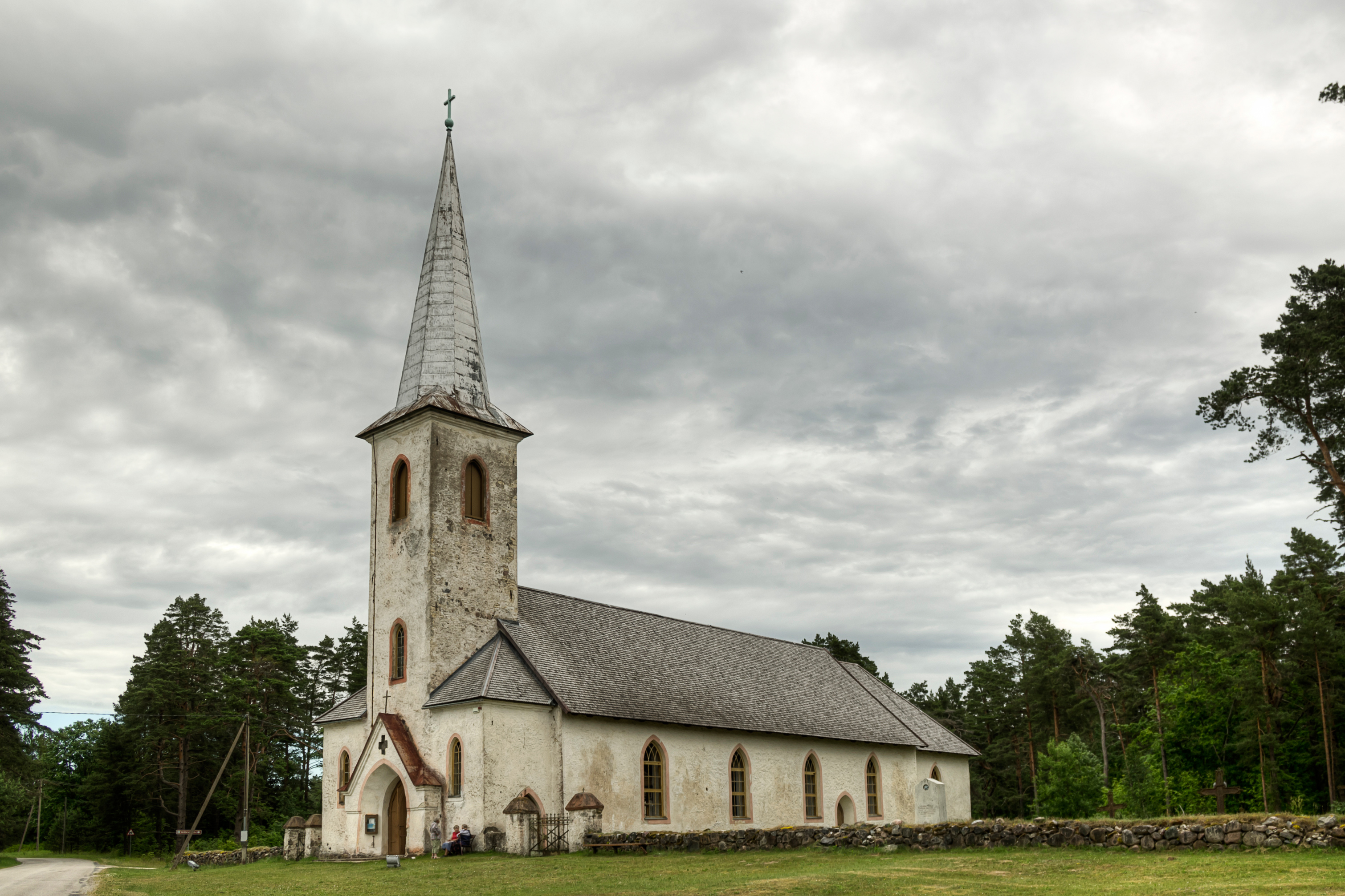 Varbla kirik